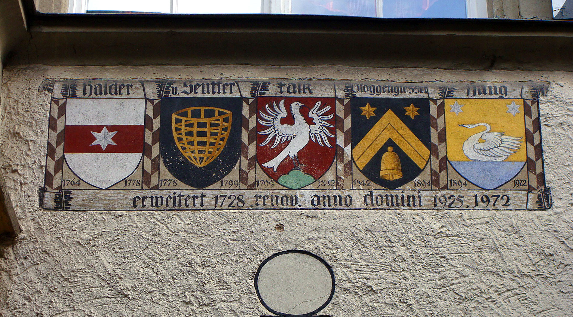 Wappen von Lindauer Patrizierfamilien (Lindau im Bodensee)